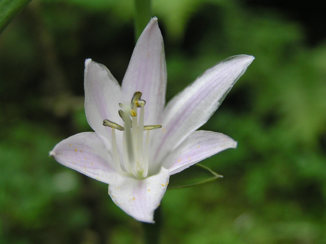 オーレオマルギナータ